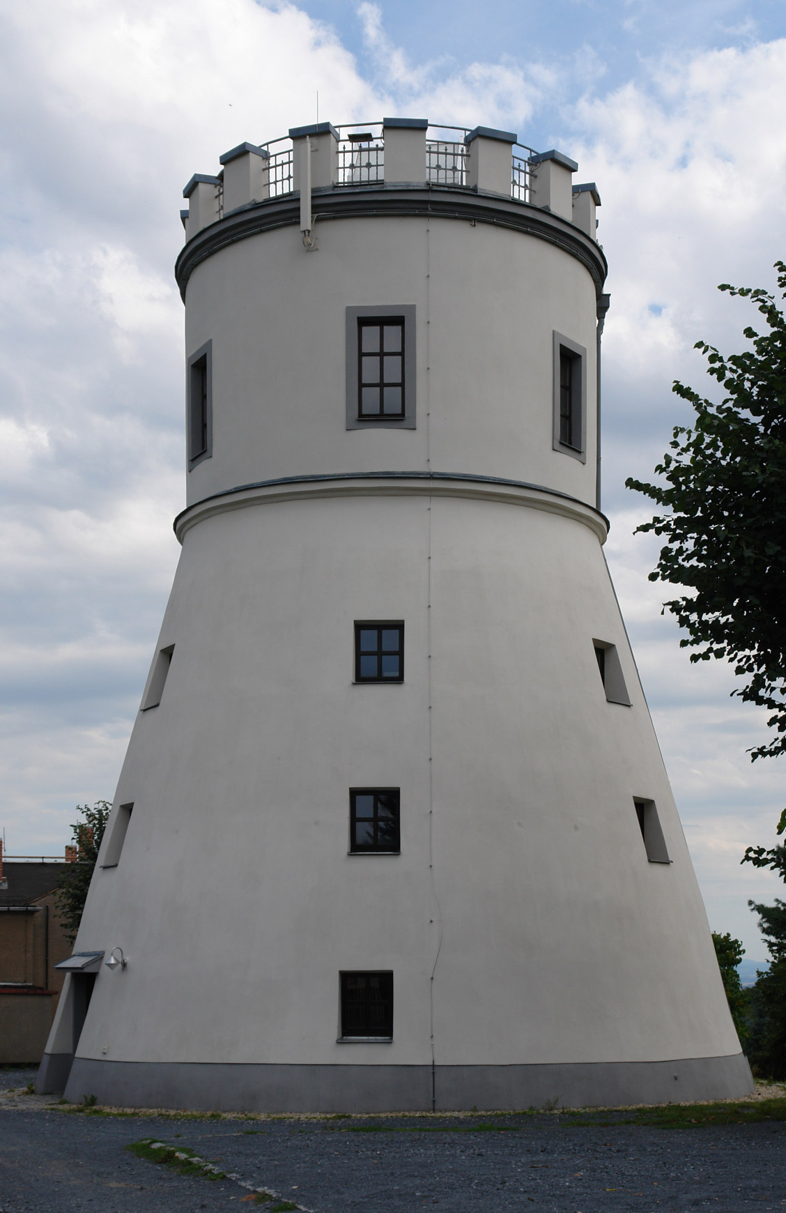 Boxdorfer Mühle